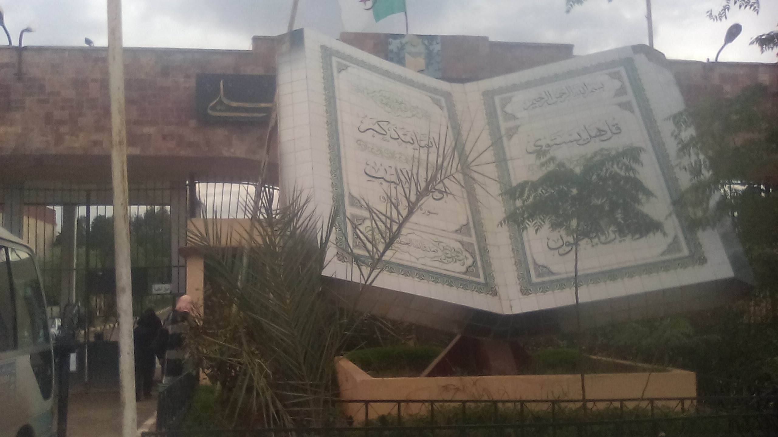 Uhbc de salem